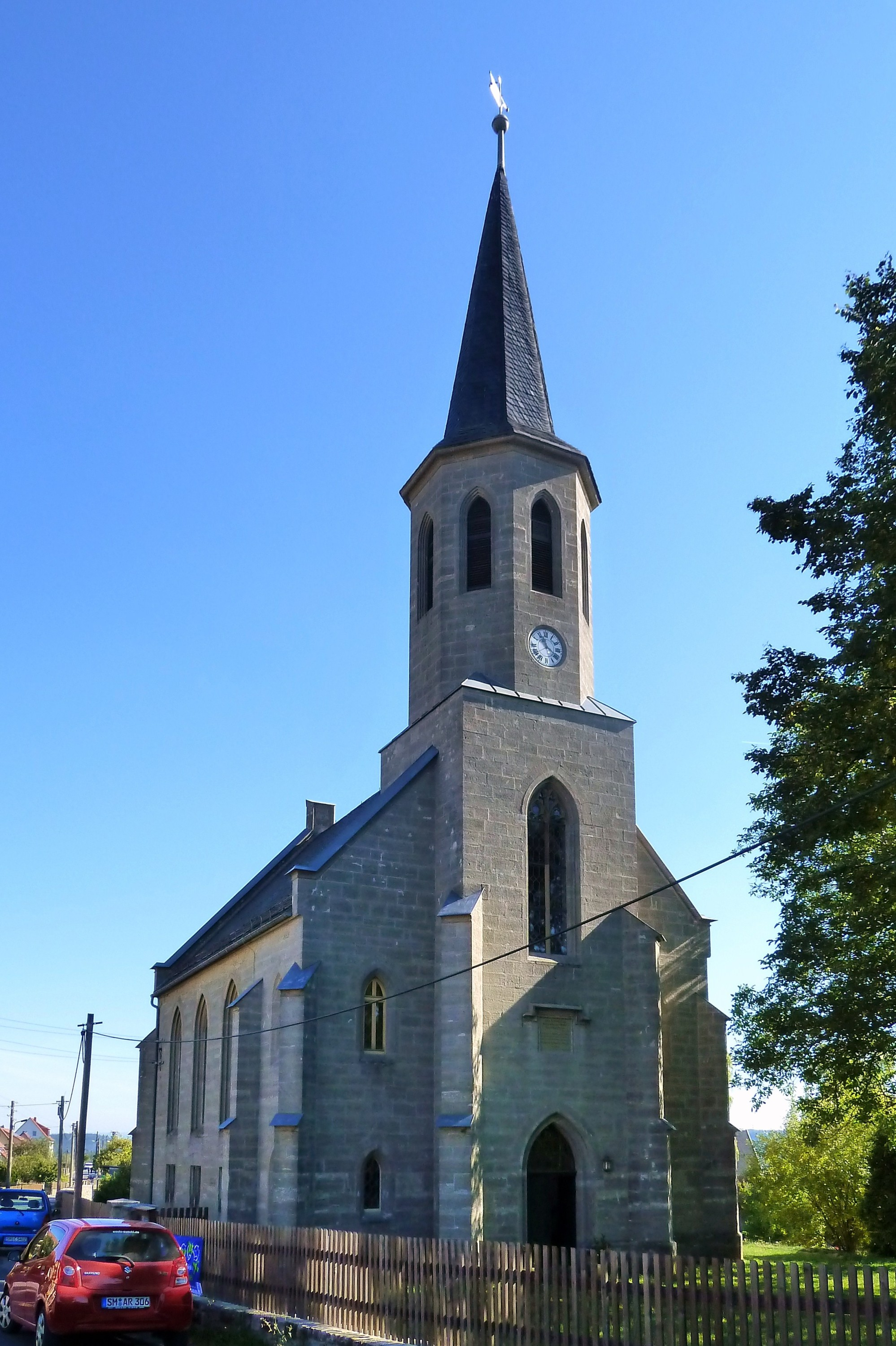 Gemeindekirche von Dreißigacker, einem Ortsteil der Stadt Meiningen